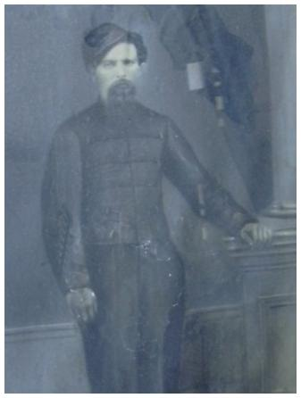 Fotografía de un dibujo a lápiz del Teniente Coronel Pedro Timote, donado al complejo museográfico provincial Enrique Udaondo por su sobrino Domingo Andrés López de Timote en 1937. Dimensiones: L.: 45 cm. / A.: 35 cm.